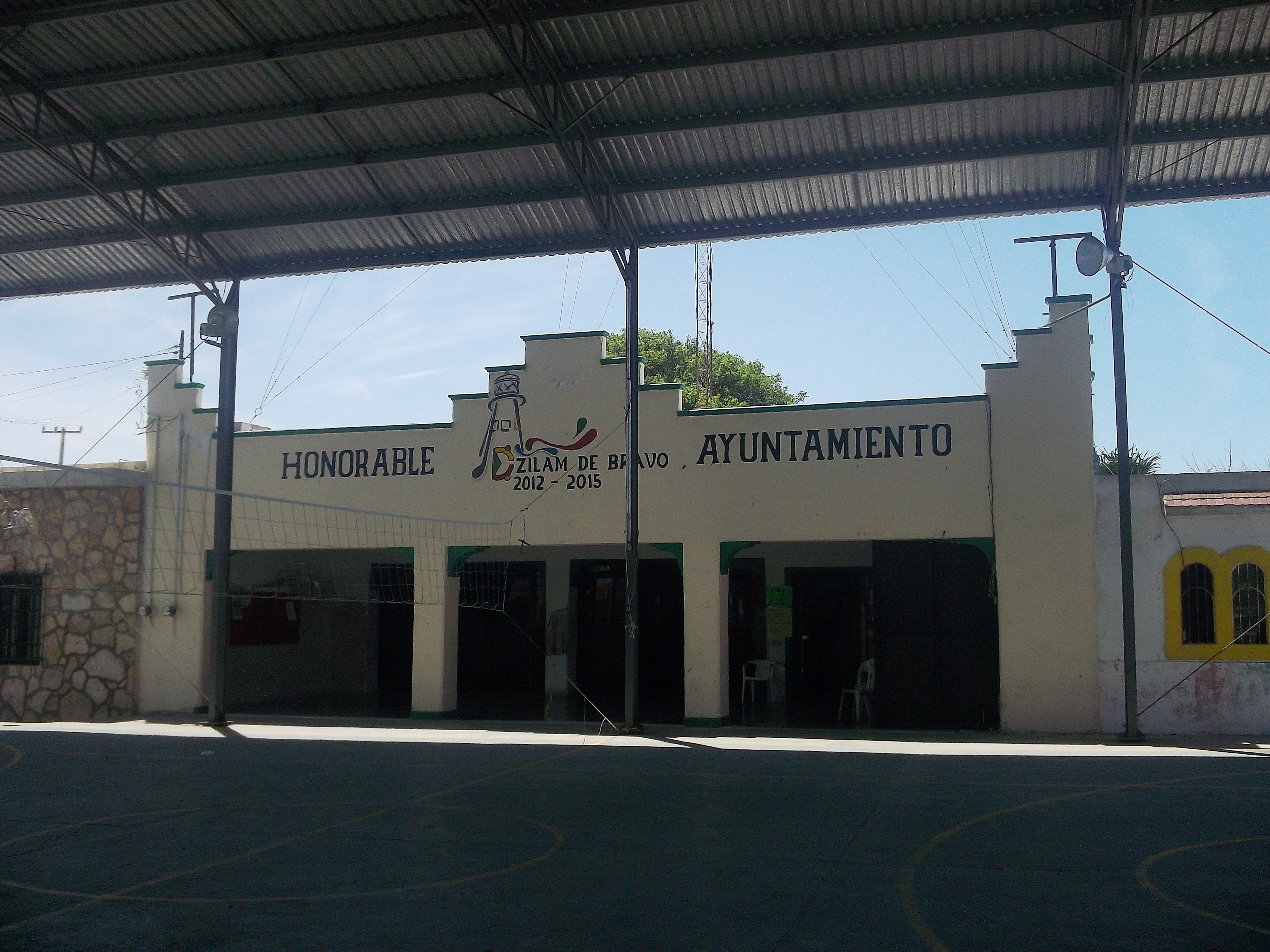 Palacio municpal de Dzilam de Bravo, Yucatán.